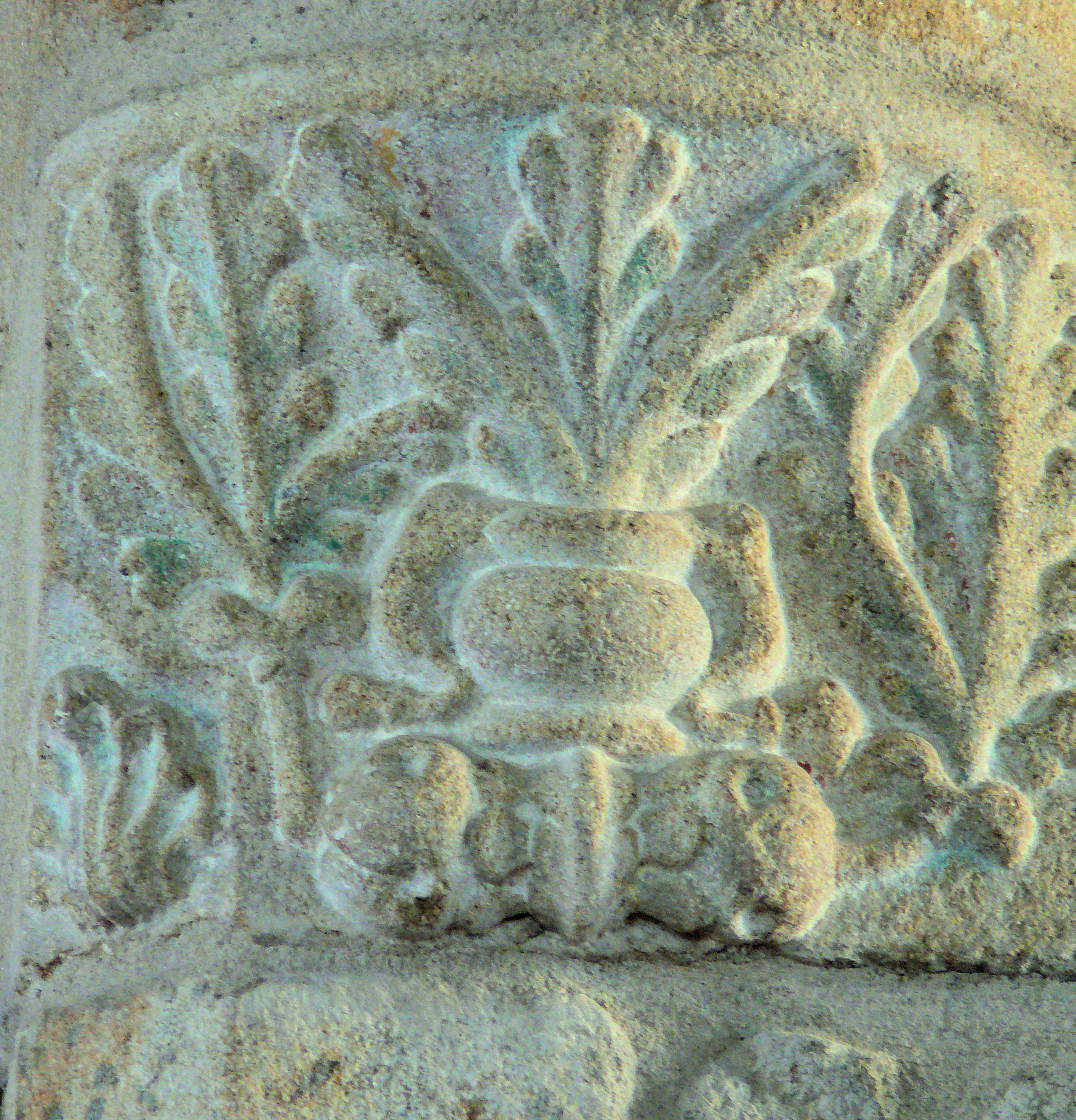 Usson-en-Forez - Eglise Saint-Symphorien - Vestige de l'église du XIIe siècle